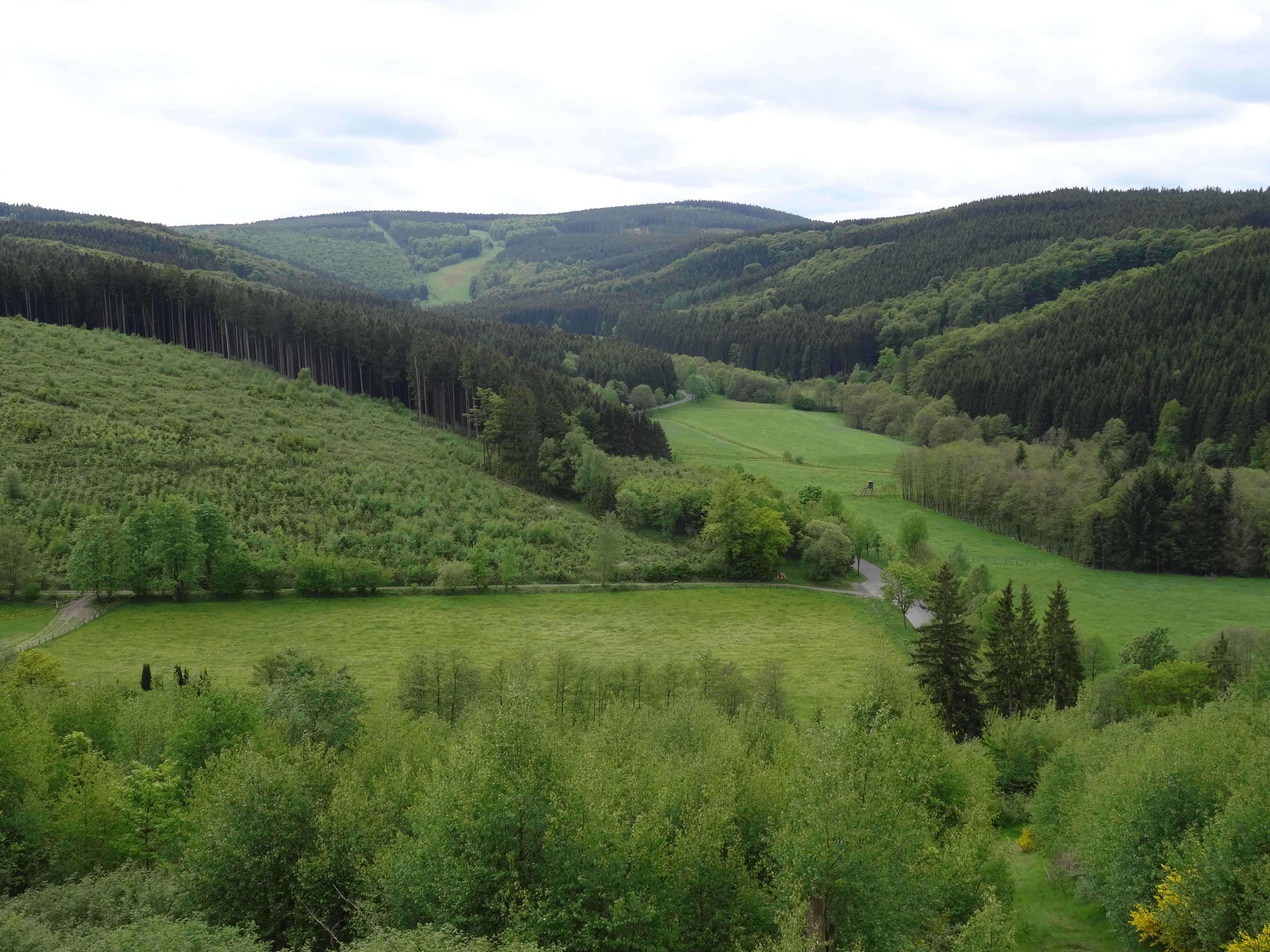 Naturschutzgebiet „Medebachtal und Quellgebiet“ (NSG HSK-267) in Olsberg. Das Medebachtal von oben. Von links das Rakental. Der Rakenbach mündet außerhalb des Fotos auf der rechten Seite in den Medebach. Der Wald gehört zum Landschaftsschutzgebiet Olsberg